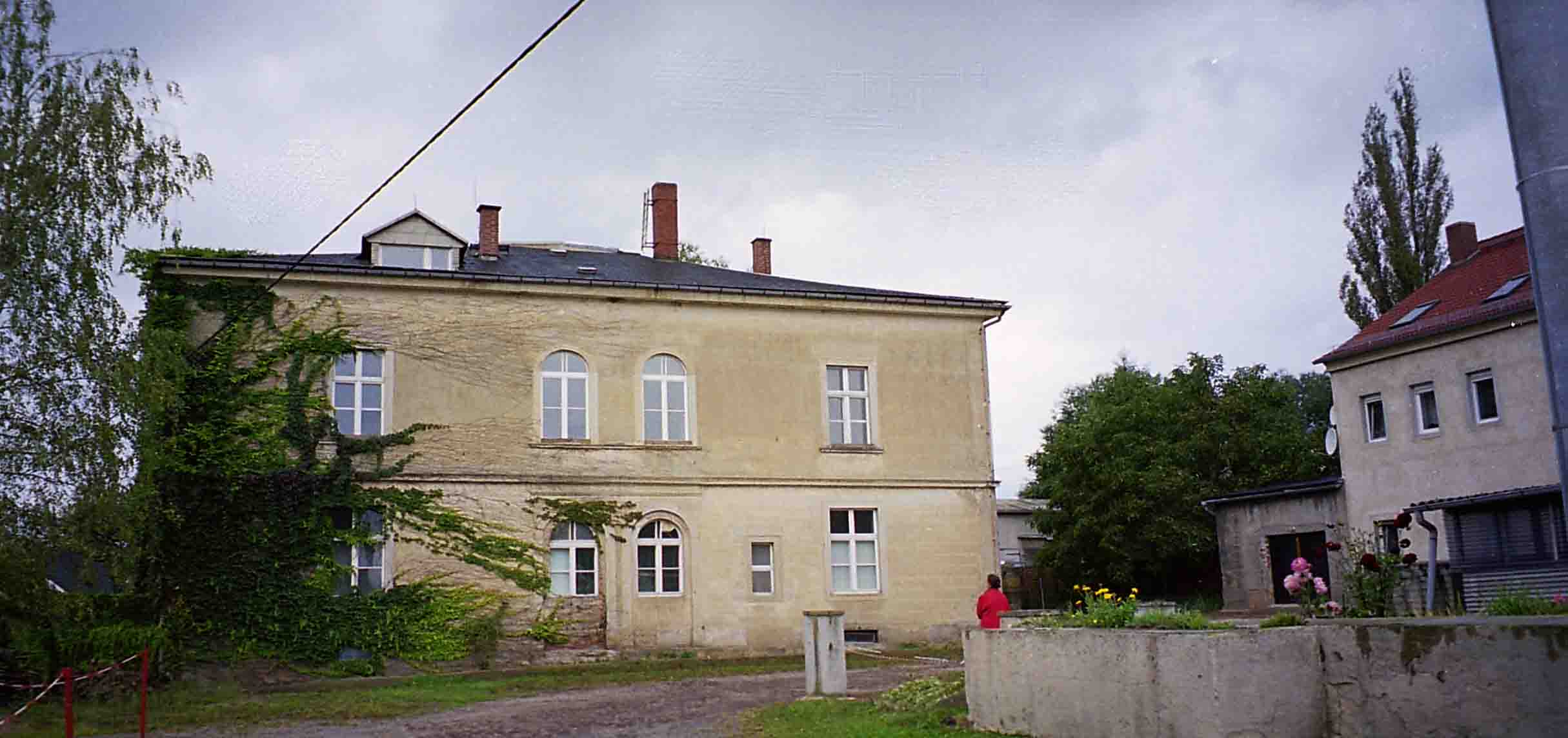 Rittergut Görlitz 2001